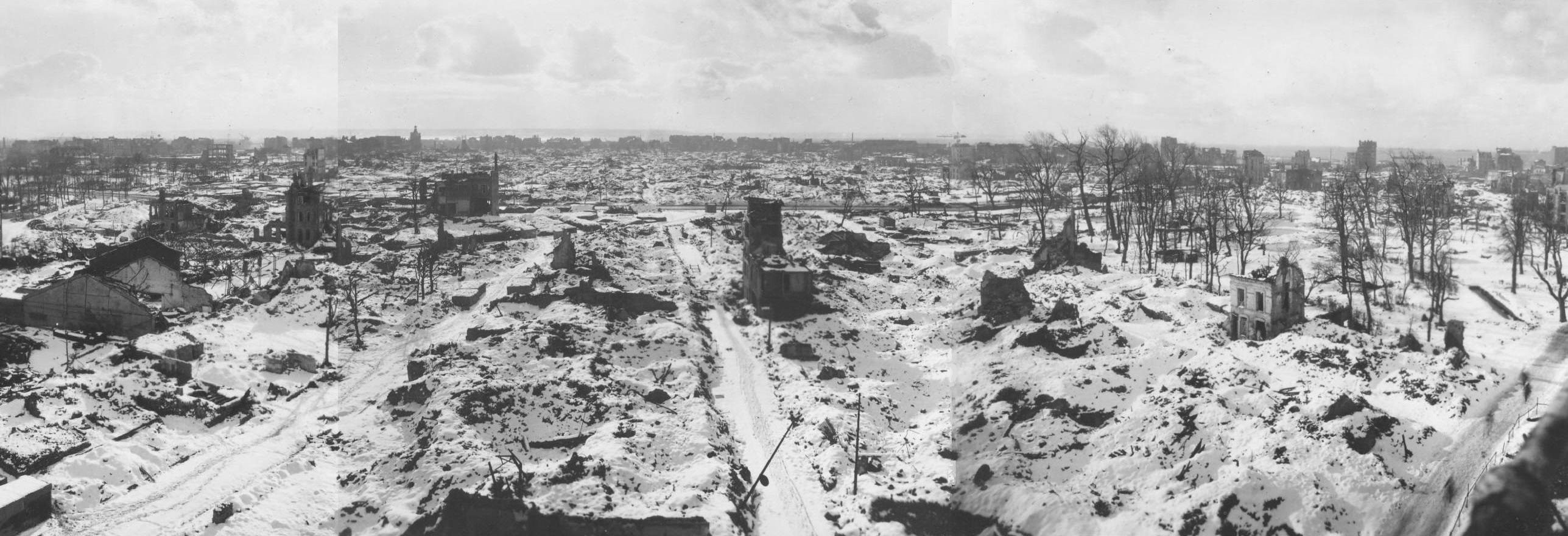 Quartier Saint-Joseph et square Saint-Roch